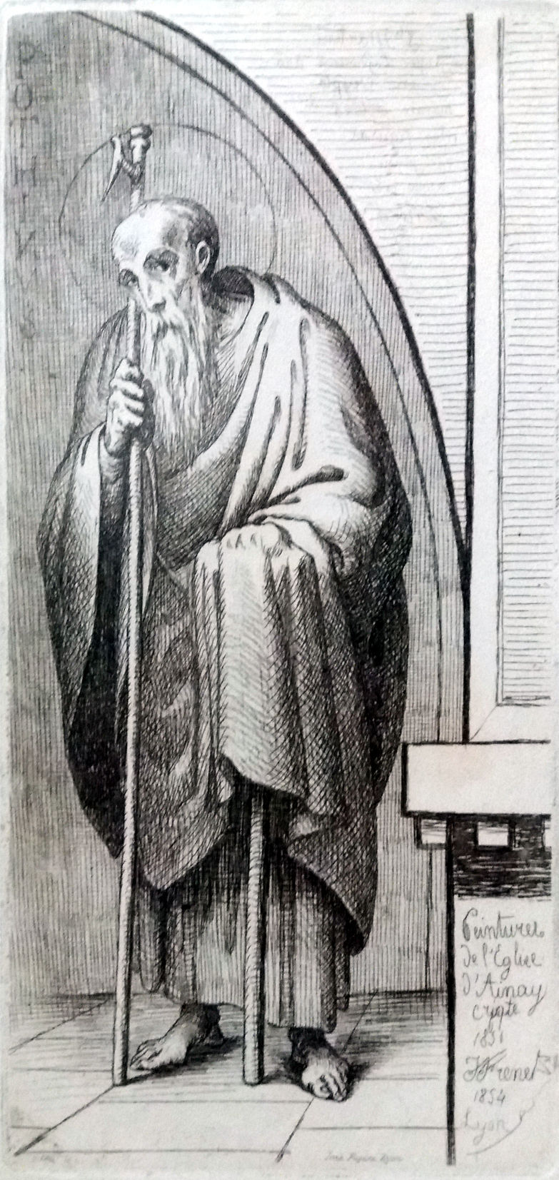 Eau forte représentant saint Pothin, évêque de Lyon. D'après les fresques de Jean-Baptiste Frénet pour l'église Saint-Martin d'Ainay. Lyon, 1854. Conservée au musée Gadagne d'histoire de Lyon, don Charvet (1928), inventaire N.499.14.